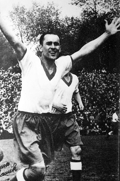 Johann Adamik im Dress des SV Sodingen